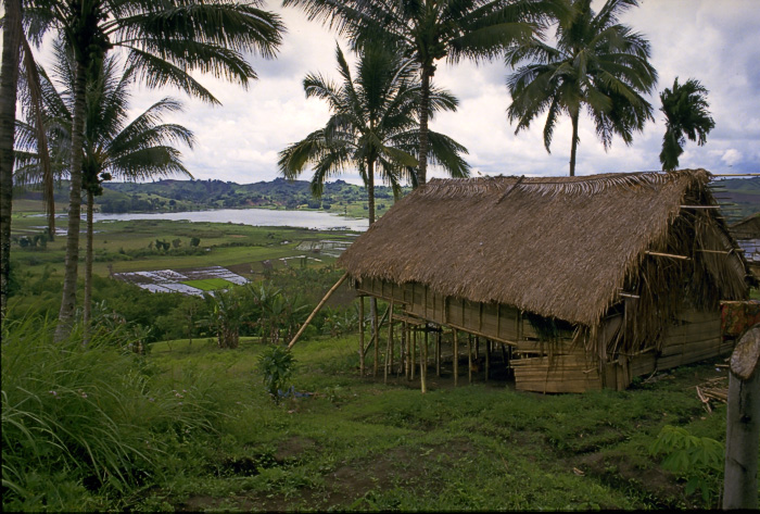 A Tboli Nipa hut in Southern Philippines (original description: "Bahay kubo ng mga T'boli")